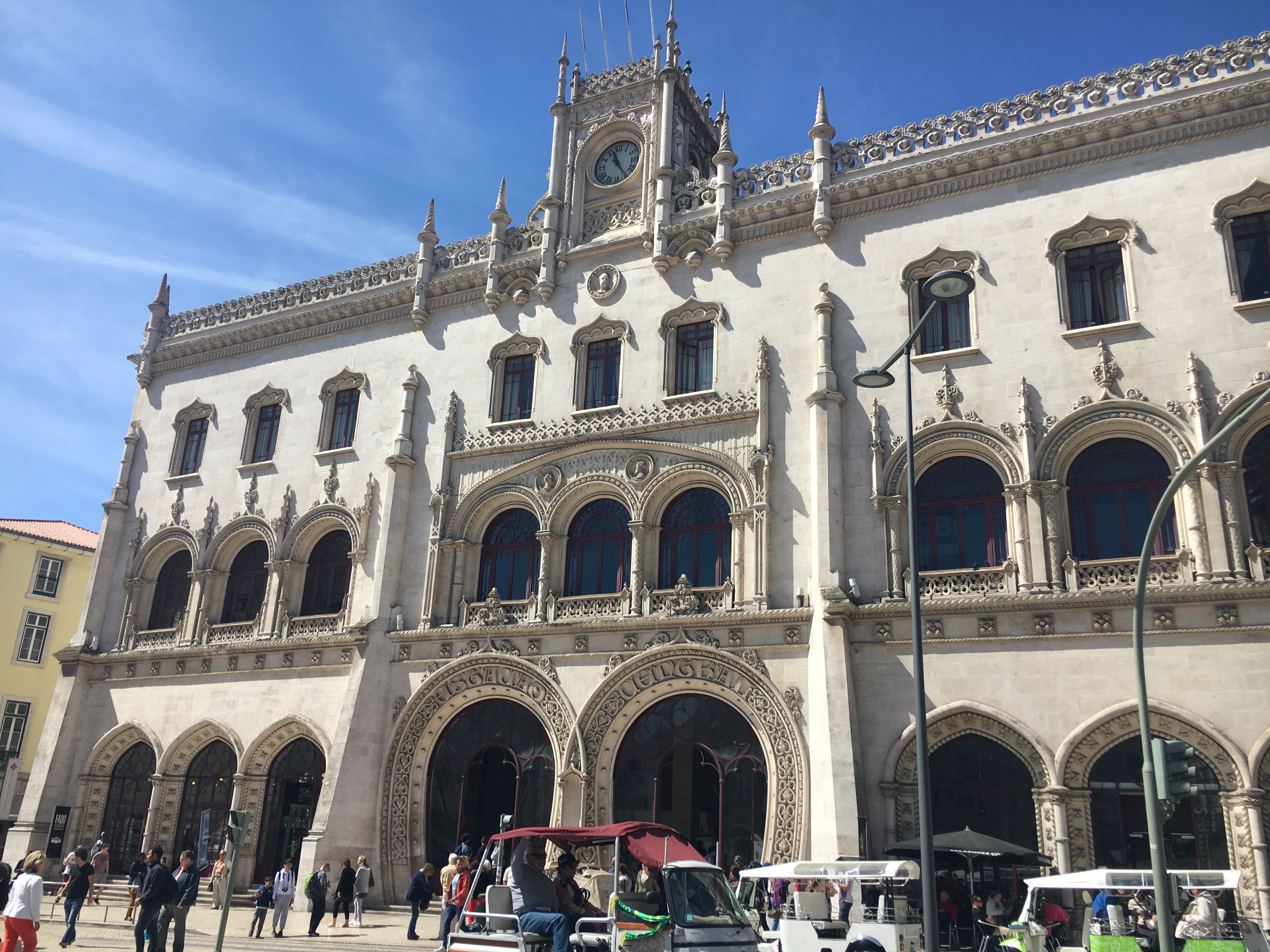 Lisbon, Portugal